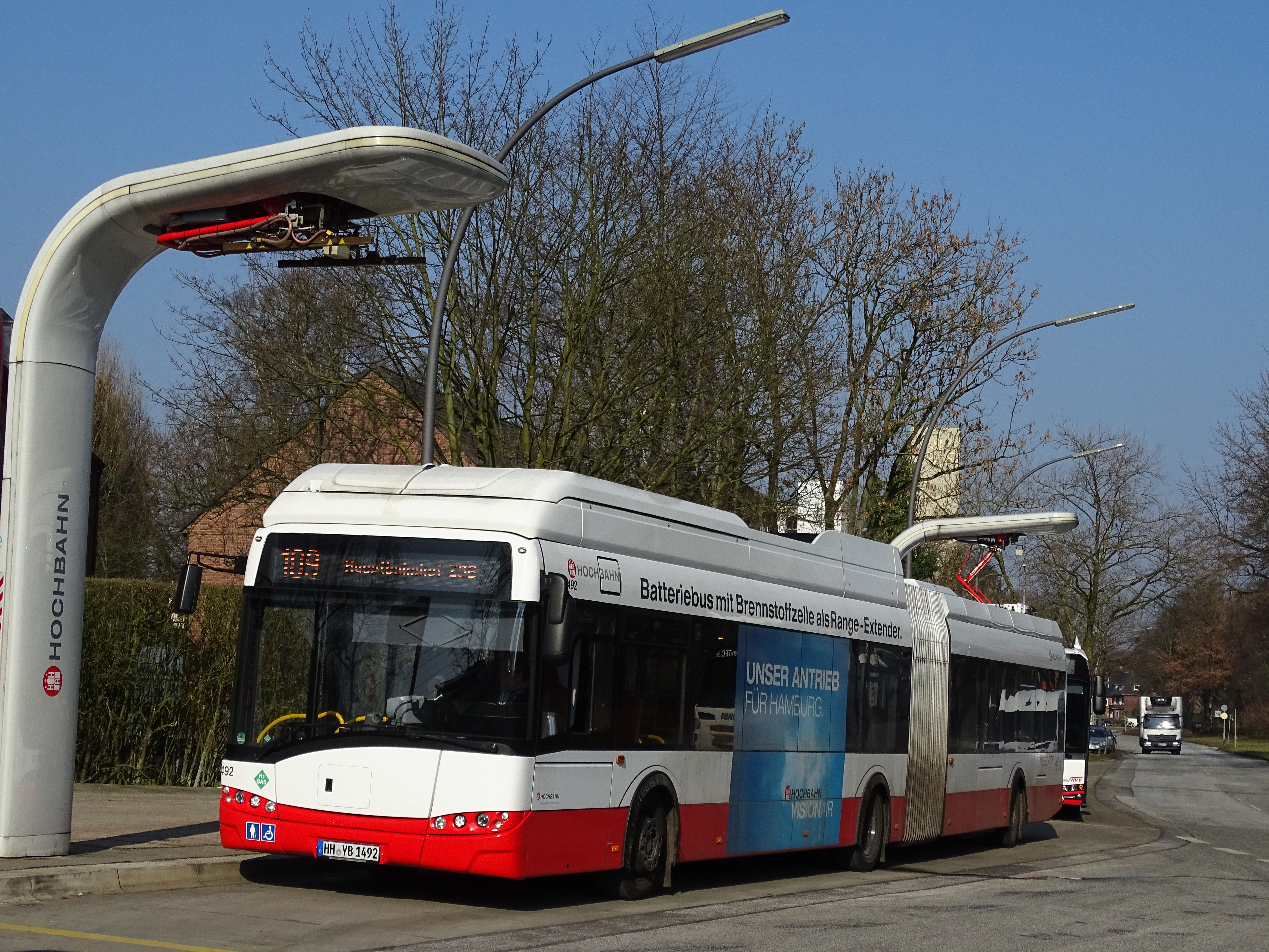 Batteriebus mit Brennstoffzelle als Range-Extender der Hochbahn Hamburg in Alsterdorf.